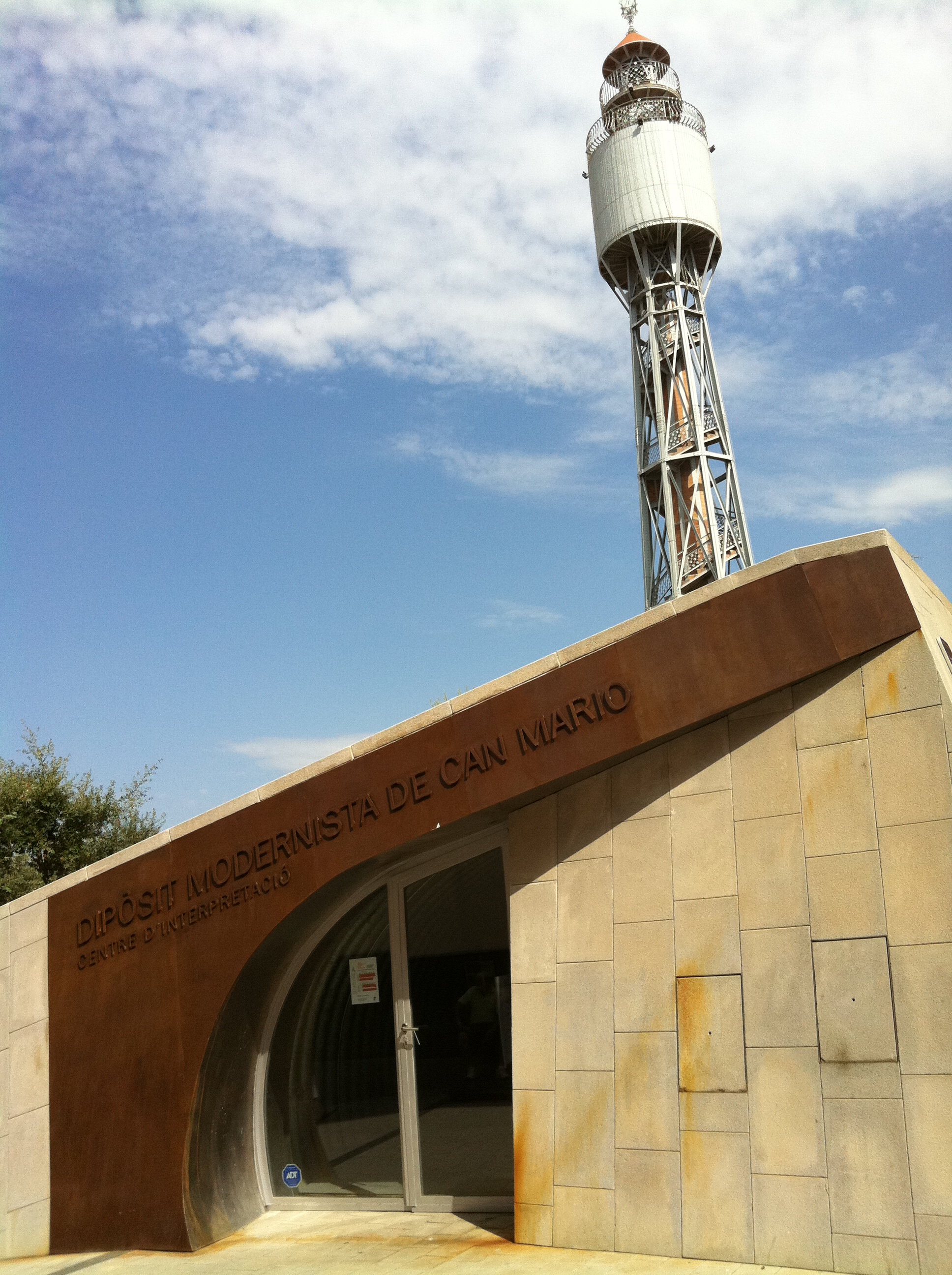 Dipòsit Modernista de Can Mario- entrada zona museu